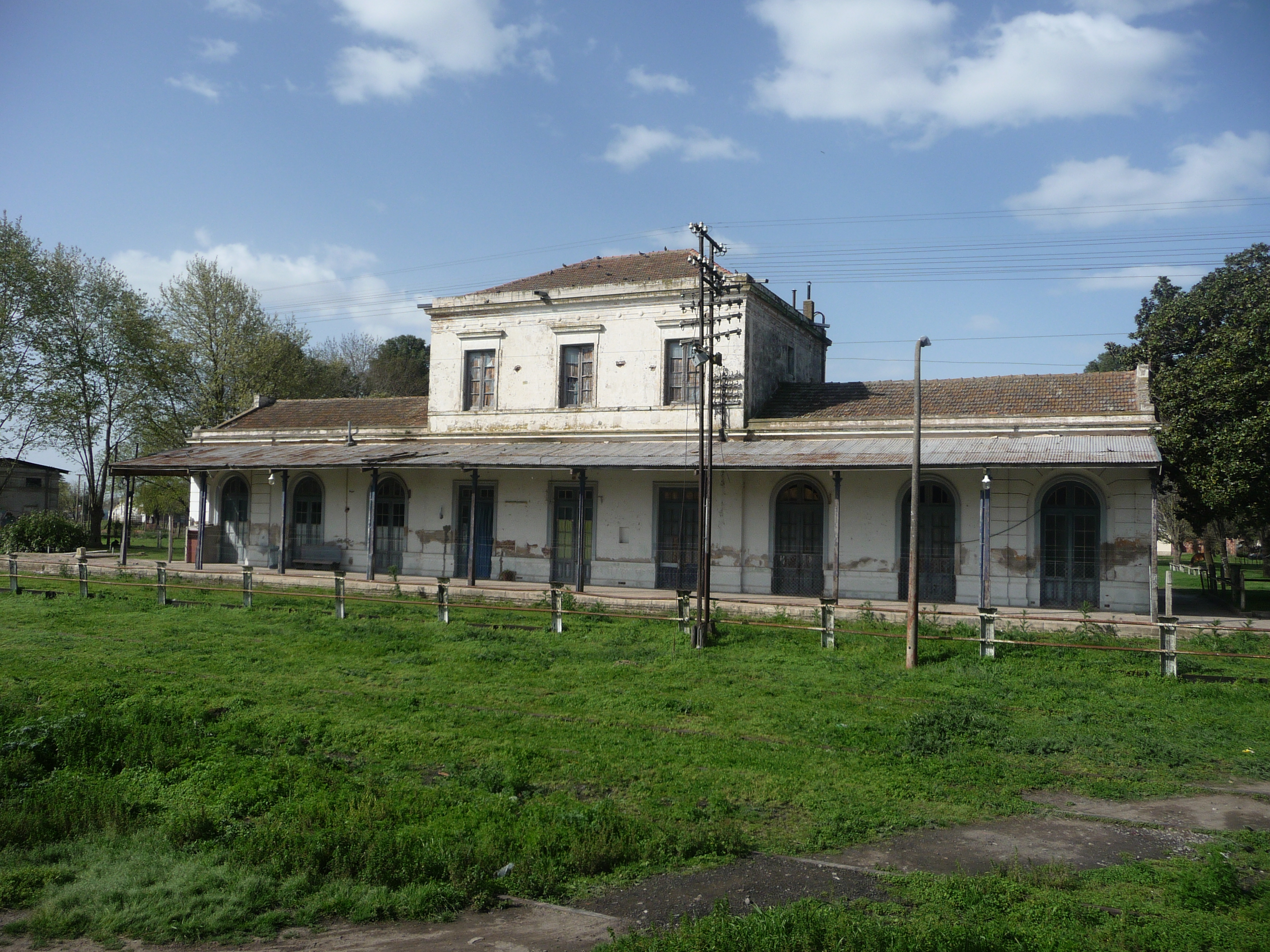 Sector del casco urbano de San Antonio de Areco y Estación del Ferrocarril Nuevo Central Argentino